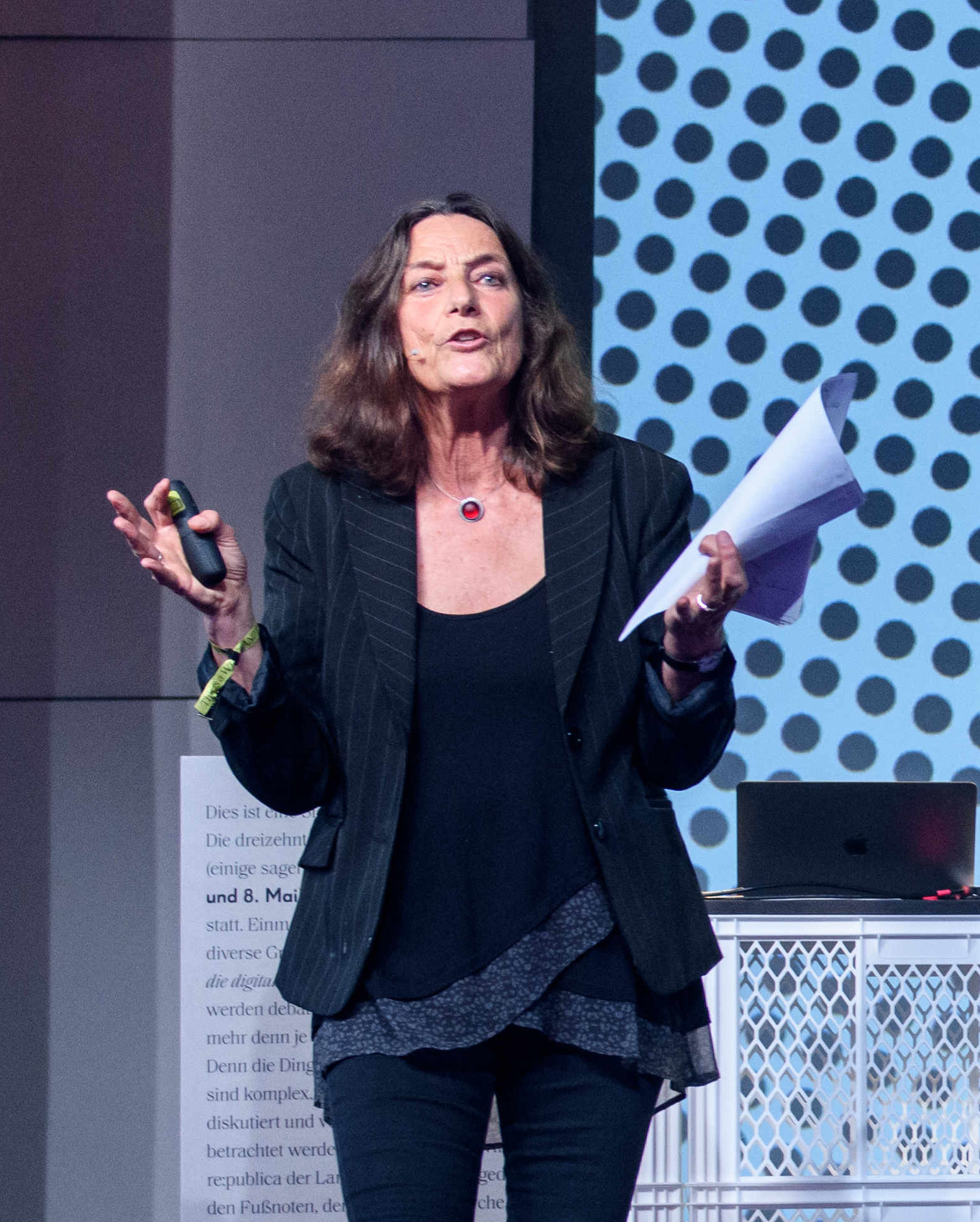 Talk: Digitalität und die Kulturtechnik der Verflachung Speaker: Sybille Krämer